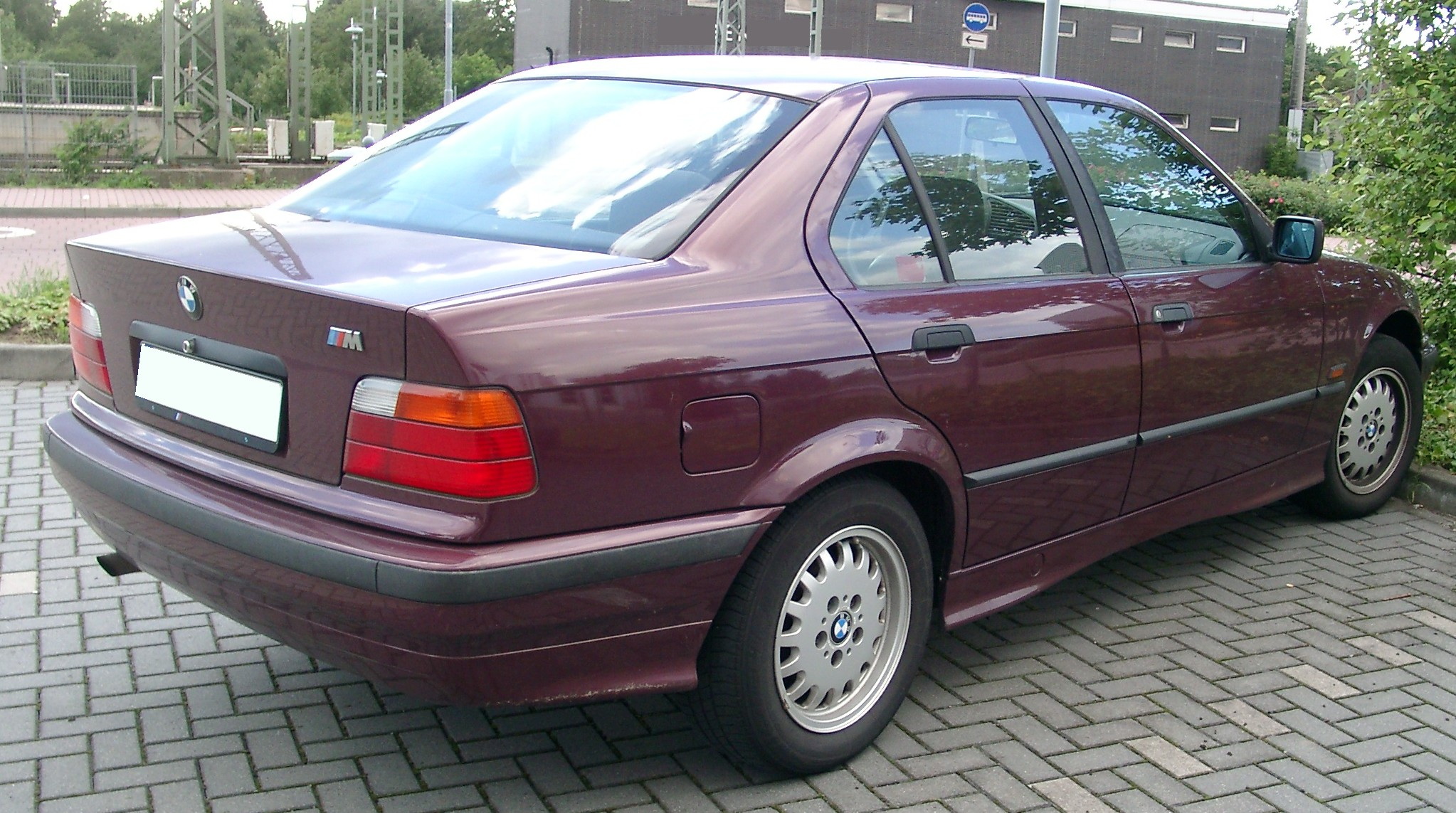 BMW E36